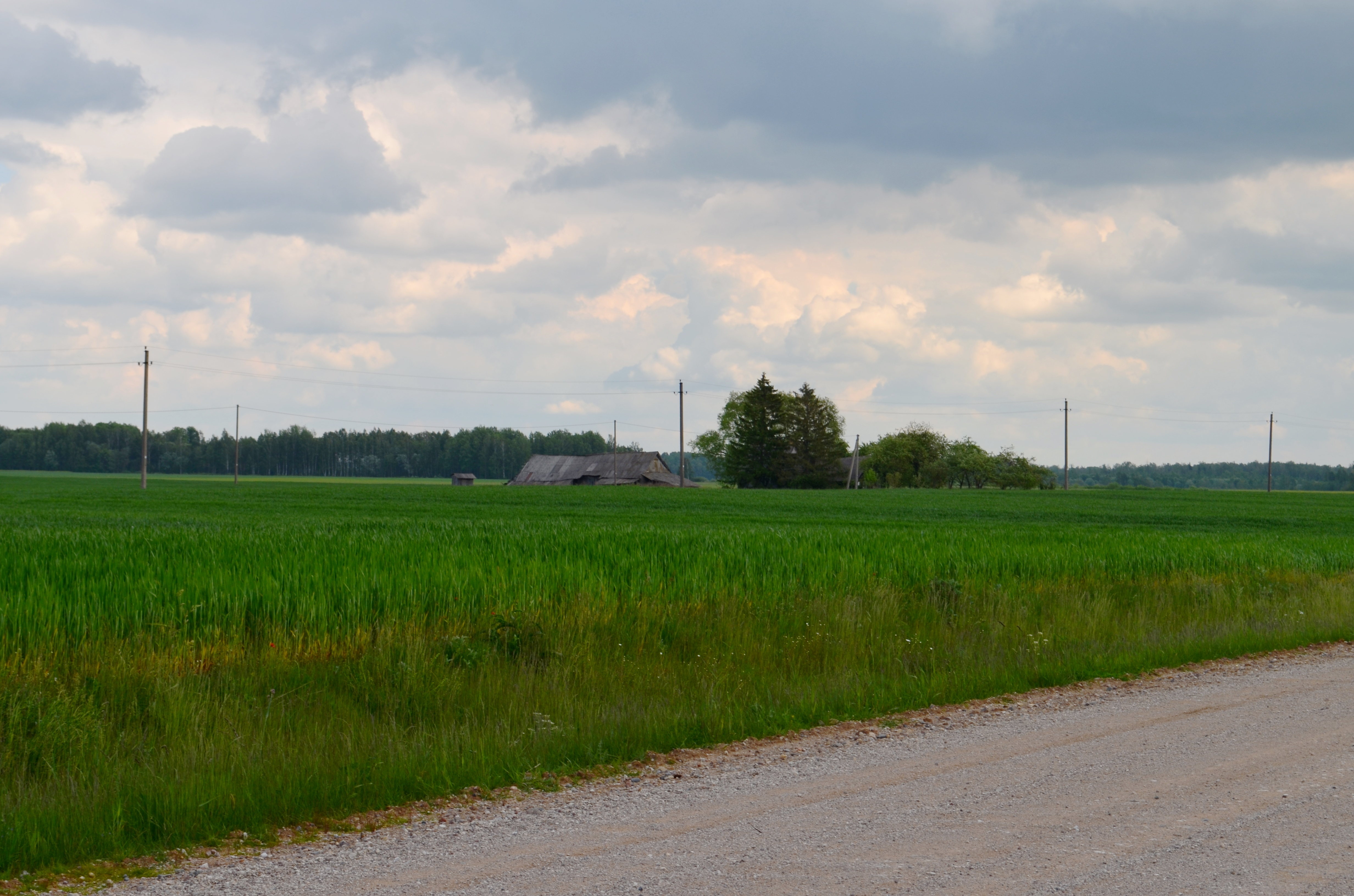 Miliešiškiai, Panevėžio raj.